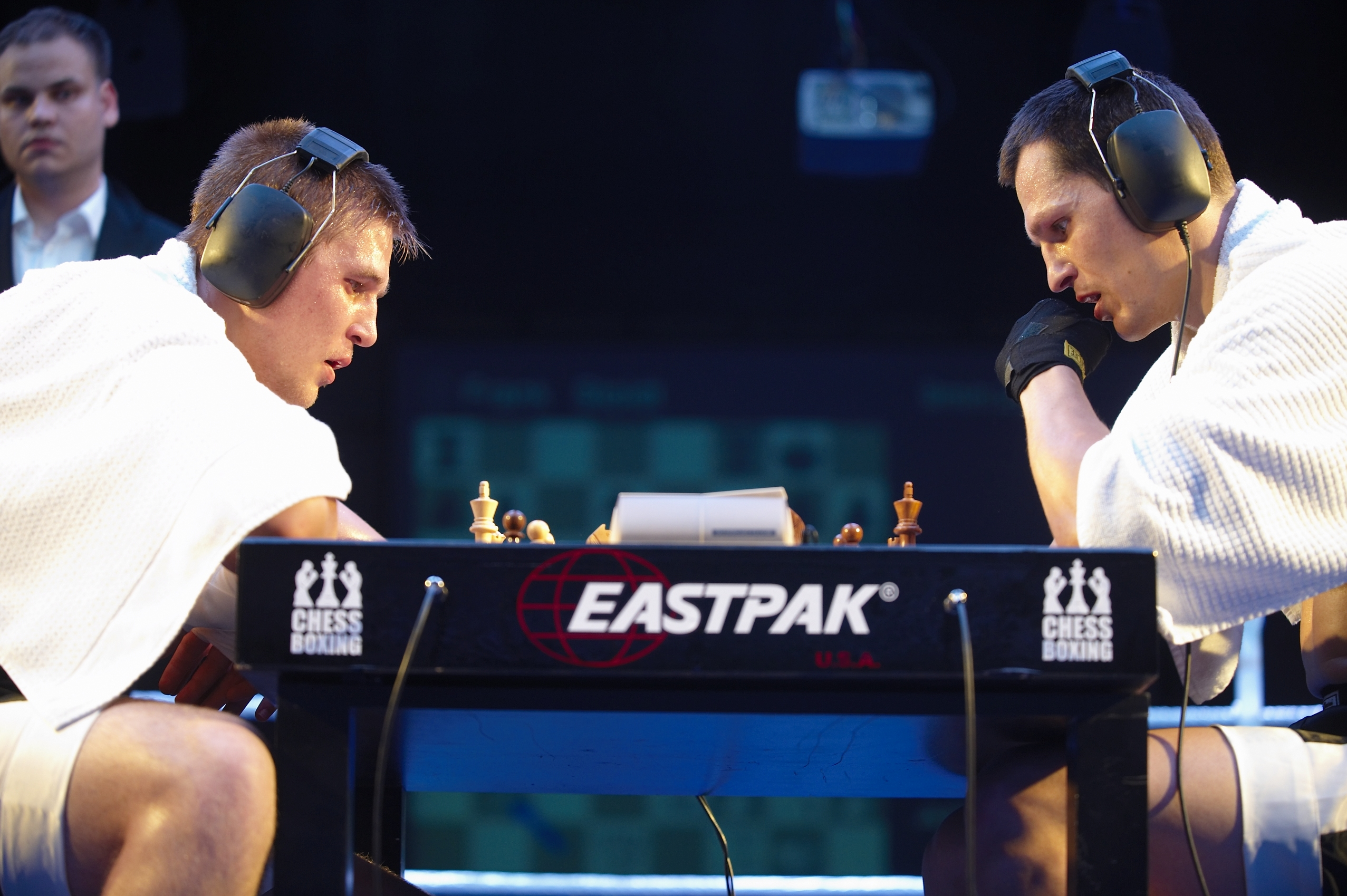 Das Bild zeigt die Sportart Schachboxen. Abgebildete Personen sind auführende Athleten bei einem der Öffentlichkeit zugänglichen Event am 5.7.2008. Alleiniger Urheber ist die WCBO (World Chess Boxing Organisation)